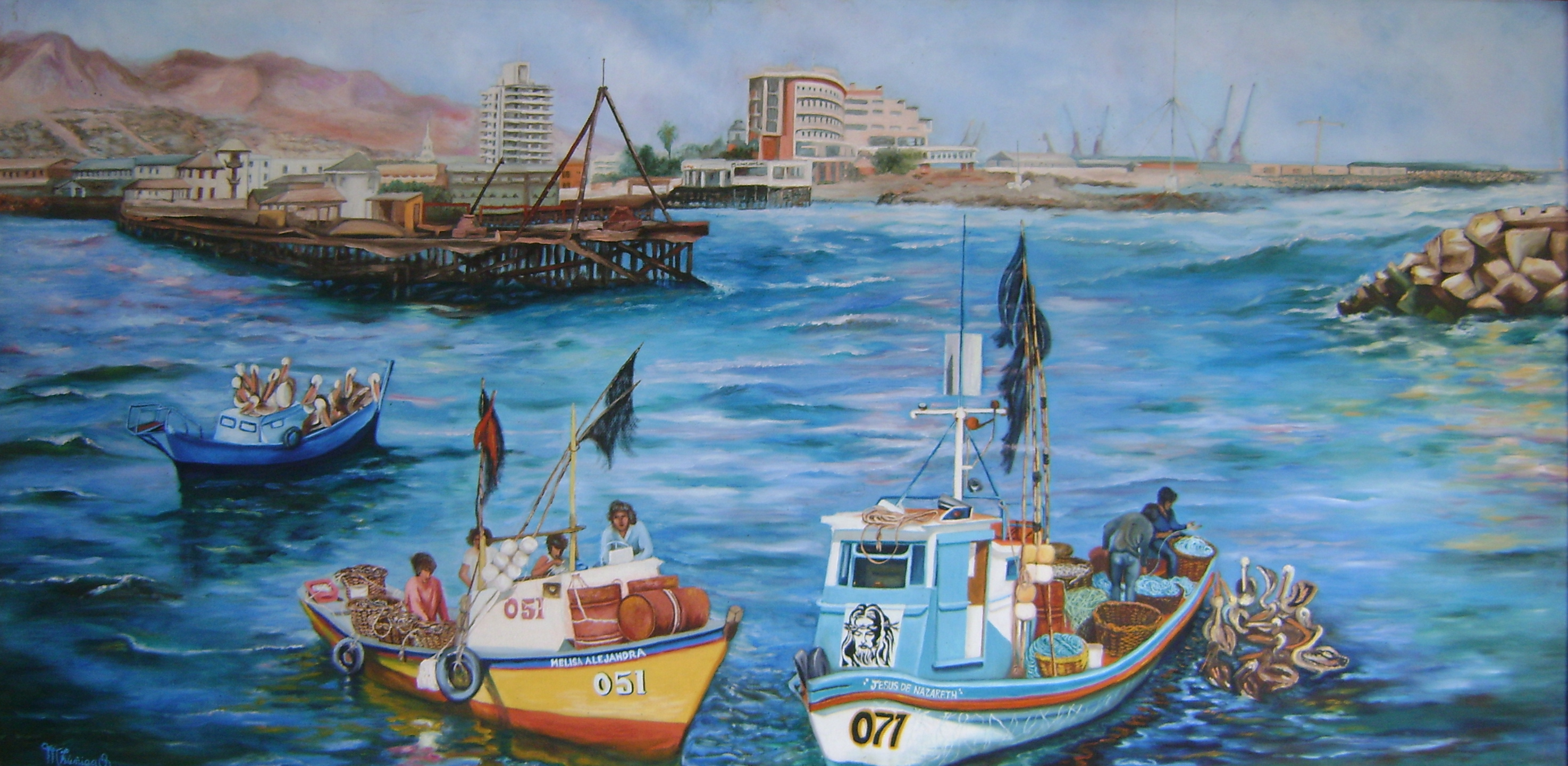 Pintura del Puerto de Antofagasta echo por mi abuelita Marta Zuñiga Otis.